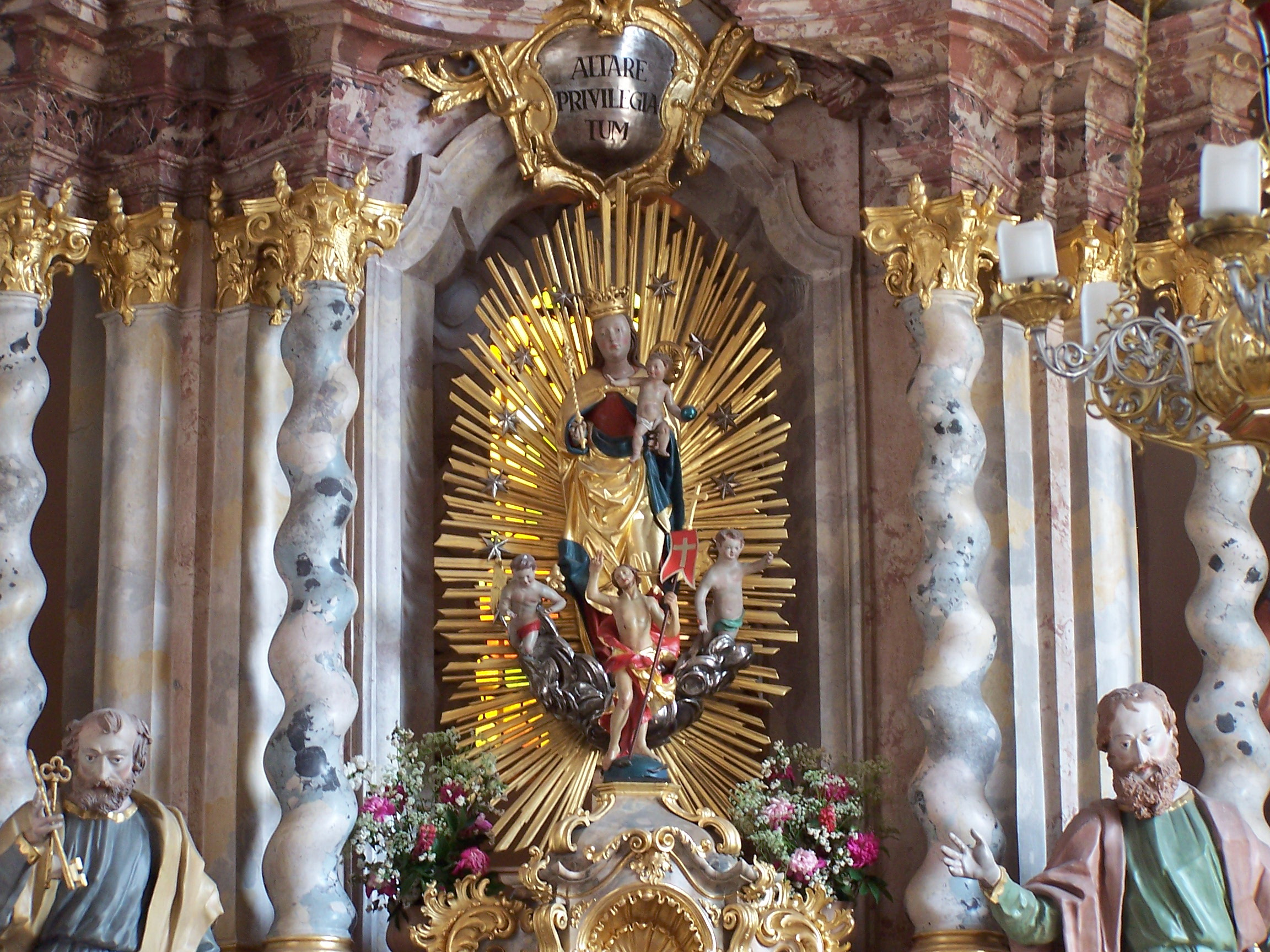 Rottenburg an der Laaber. Oberhatzkofen, Schulweg 3. Katholische Pfarrkirche Mariä Himmelfahrt. Der Hochaltar ist ein stattlicher Stuckmarmoraufbau mit vier Pilastern, vier gewundenen Säulen und großem Aufsatz mit Pilastern und Vasen. Eine gotische Holzfigur St. Maria mit Jesuskind um 1480 bildet das Zentrum des Altares.